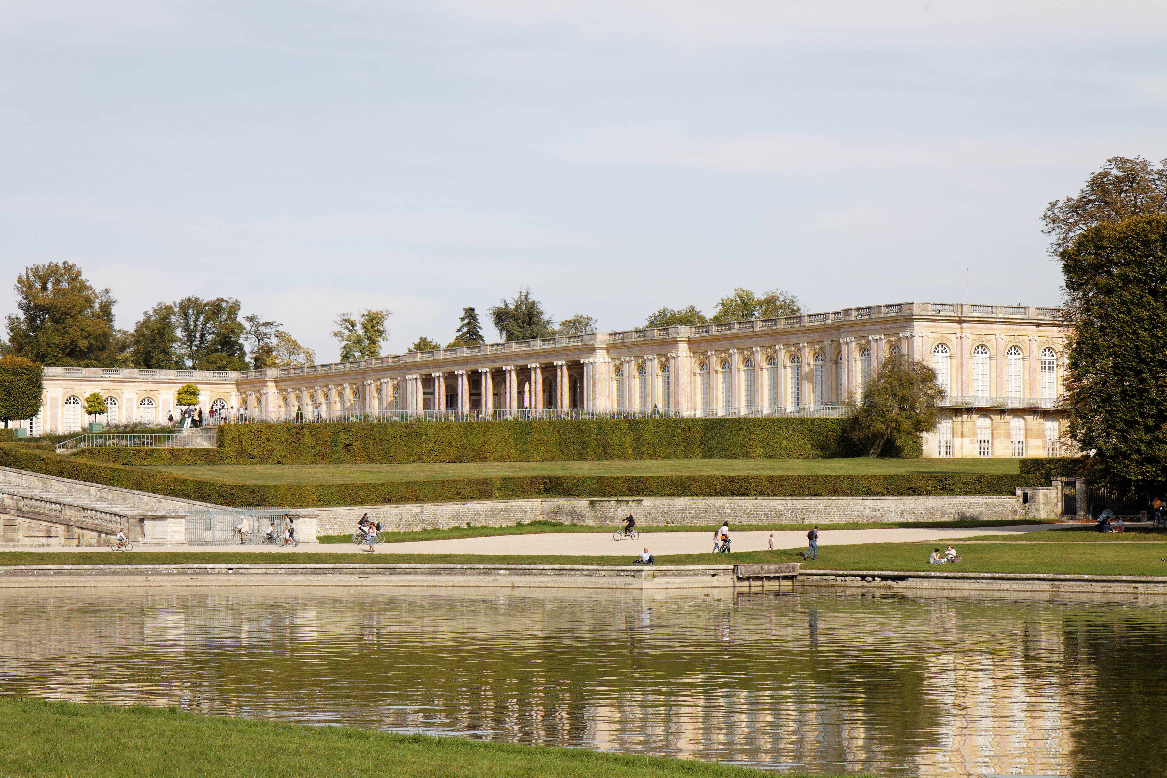 Le grand Trianon vu depuis les bords du grand canal. .